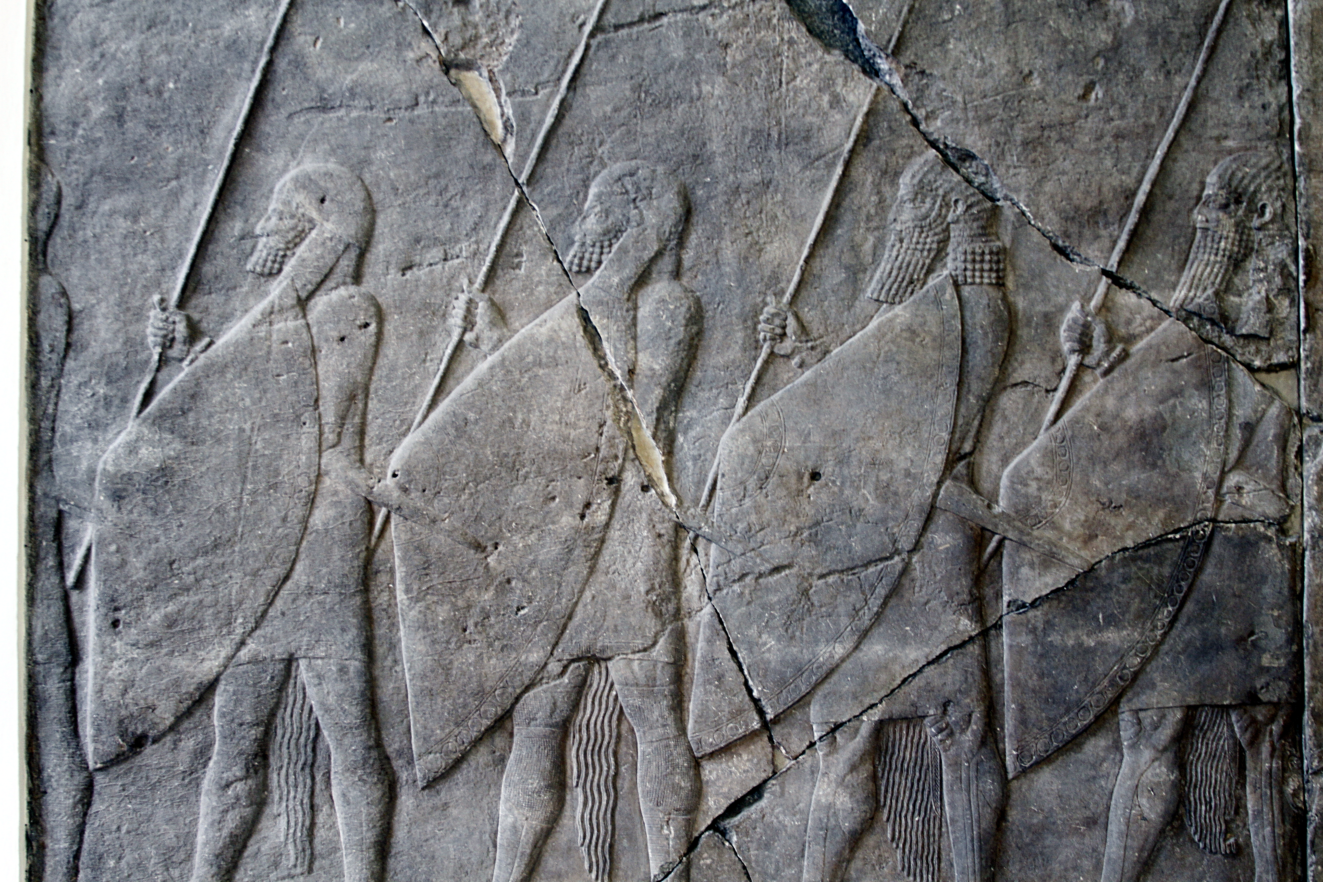 Pergamonmuseum - Berlin - Germany